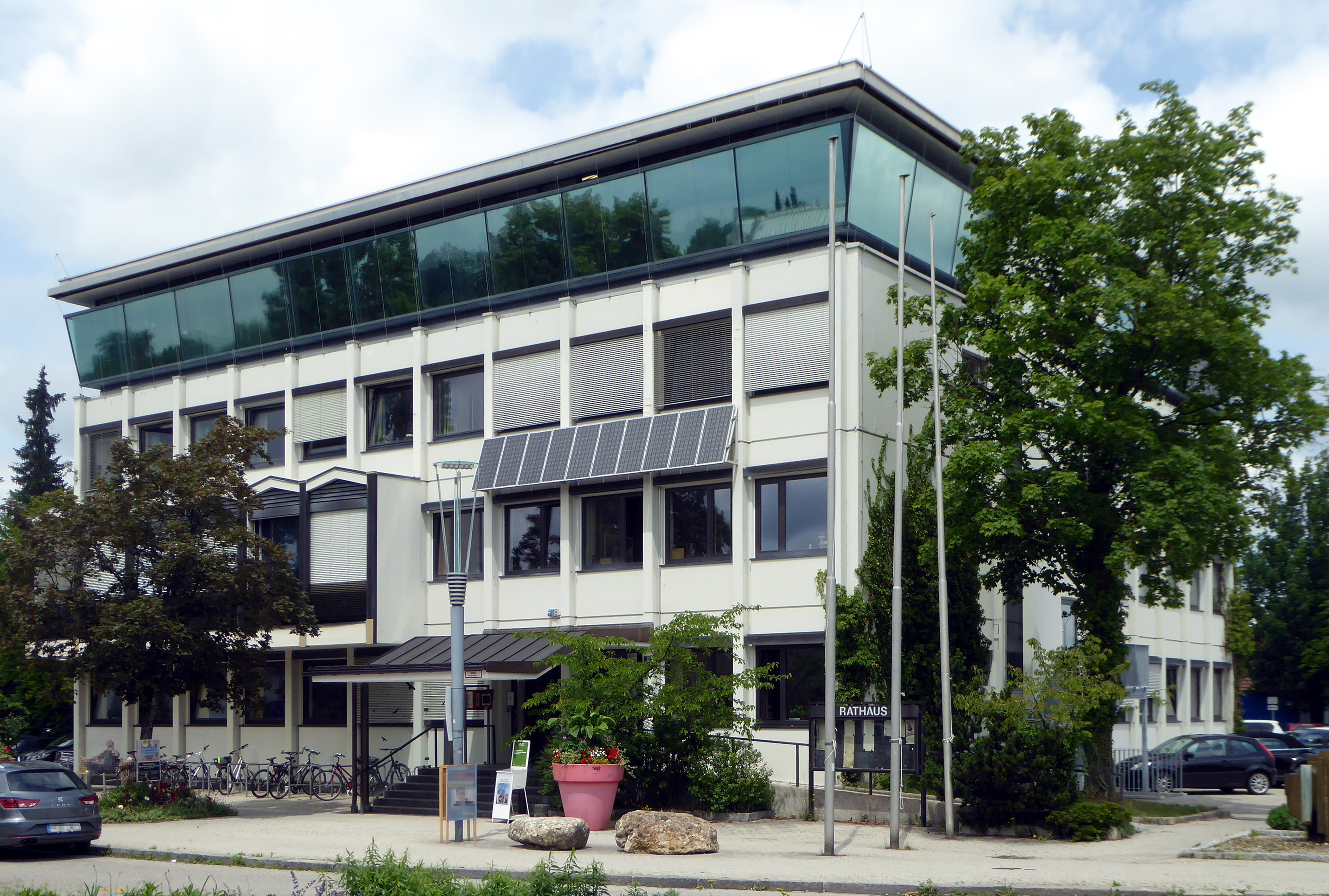 Vaterstetten, Rathaus von Südosten.